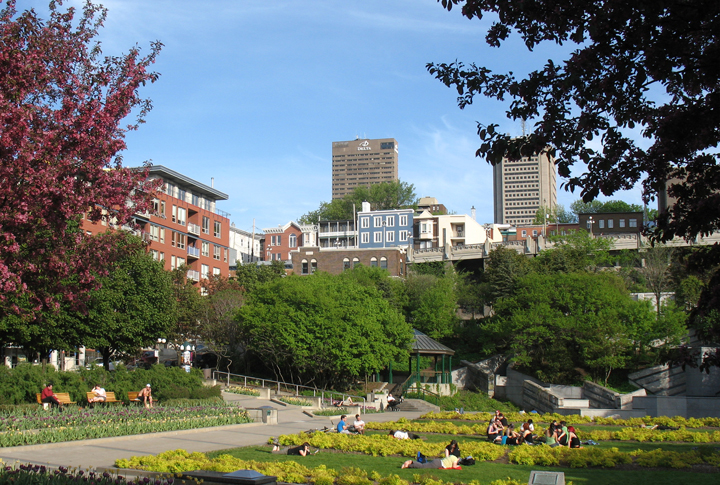 Jardin de Saint-Roch, Ville de Québec, Canada